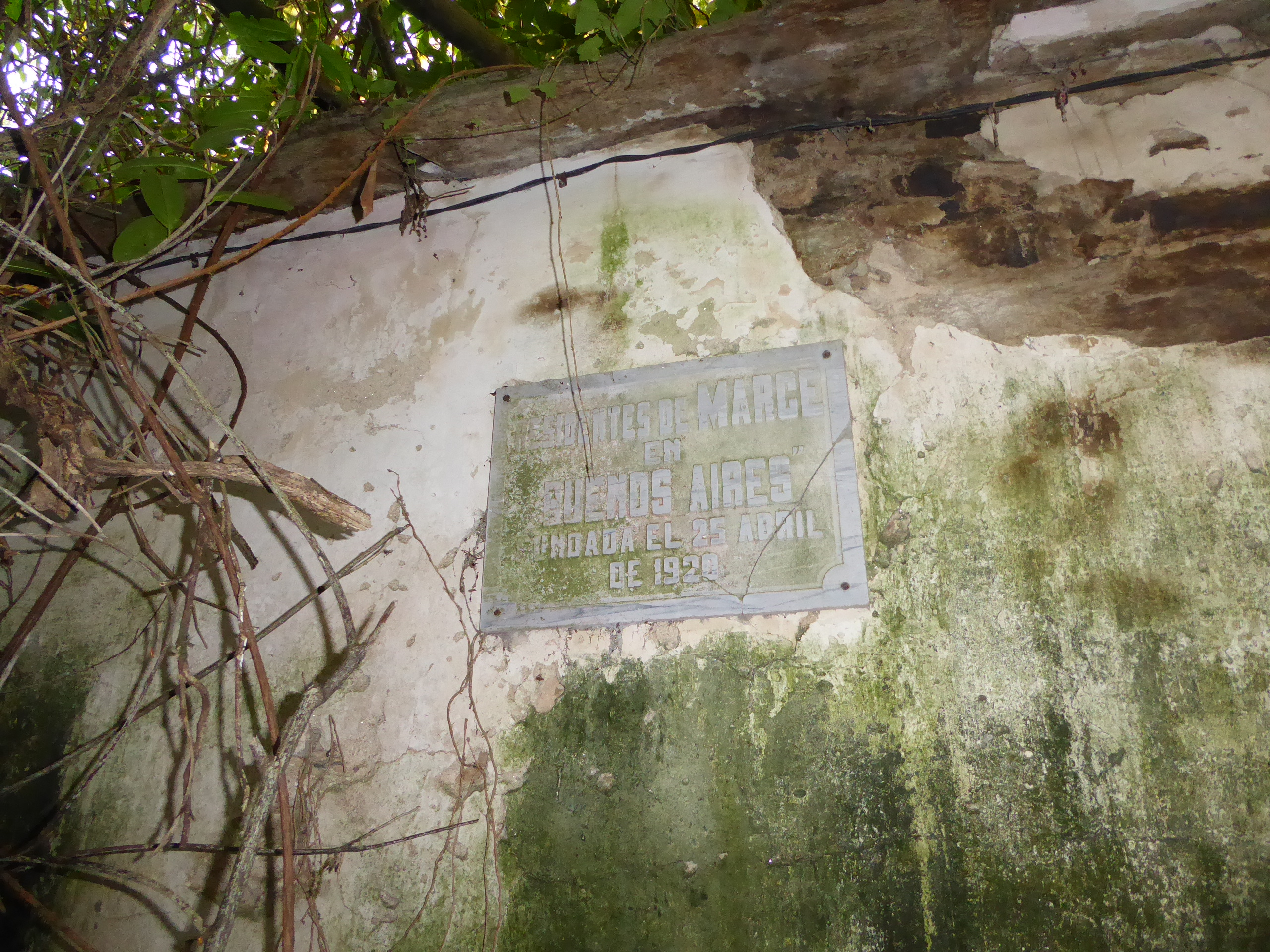 Placa en la fachada de la antigua escuela de Marce (Vilar de Ortelle)